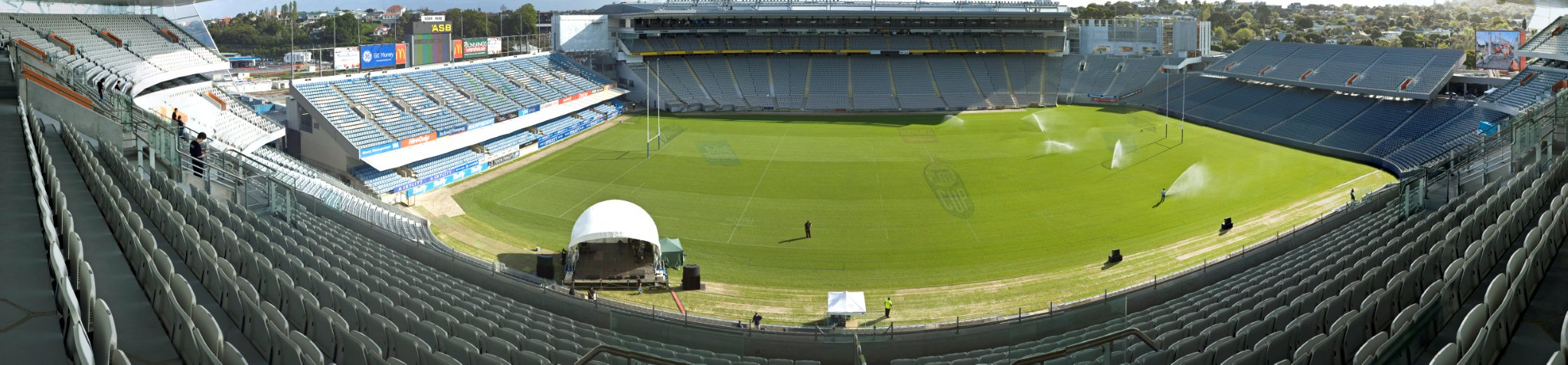 Eden Park New Stand Opening